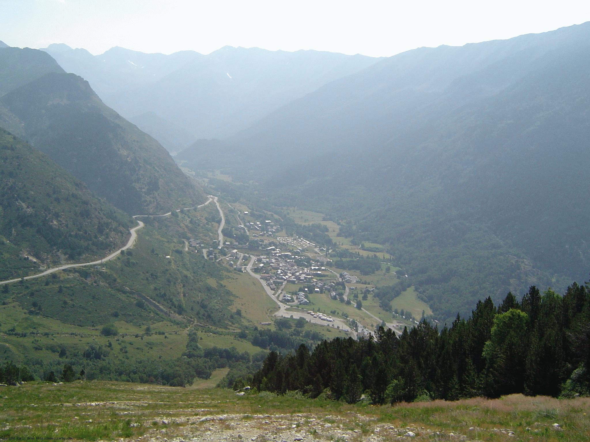 Vue de Porté-Puymorens village français situé dans les Pyrénées-Orientales au pied du Puig Carlit. Noter l'effet de fragmentation écologique et paysagère de la route et de l'habitat qui occupe presque toute la vallée, situation fréquente dans ces régions. 2005. Cevenol2